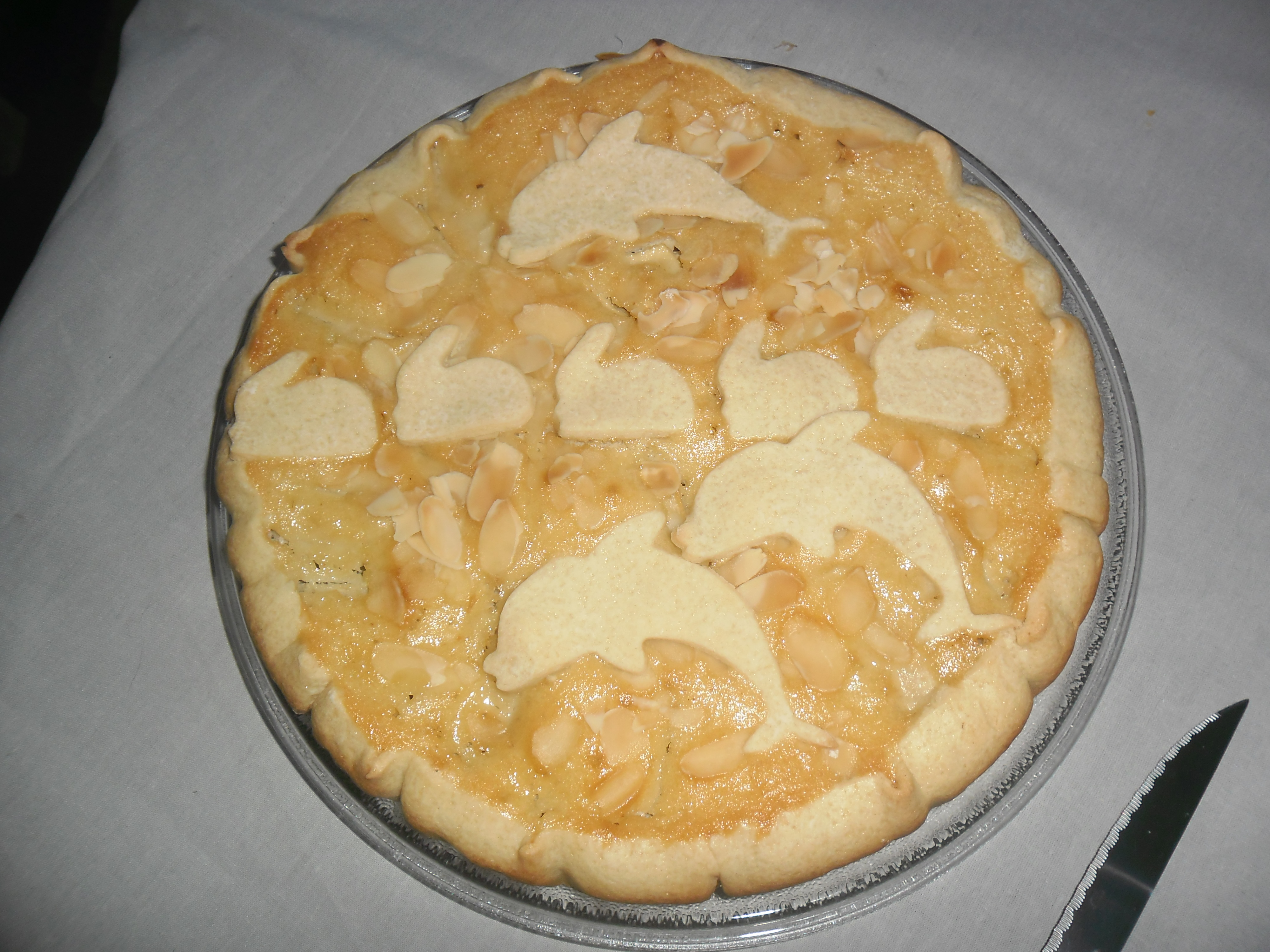 Tarte normande décorée à l'emporte-pièce